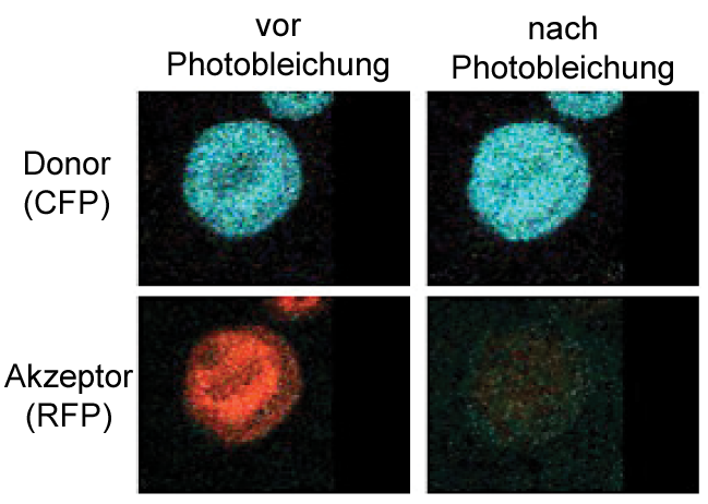 Zunahme der Donorfluoreszenz nach Photobleichung des Akzeptors in usp1-DT40-Zellen als ein auf dem Förster-Resonanzenergietransfer basierender Nachweis einer Interaktion zwischen CFP-Ub and mRFP-PCNA (Abbildung modifiziert aus Batters C, Zhu H, Sale JE (2010). "Visualisation of PCNA monoubiquitination in vivo by single pass spectral imaging FRET microscopy". PLoS ONE 5 (2): e9008. PMID 20126408. PMC: 2814862.)